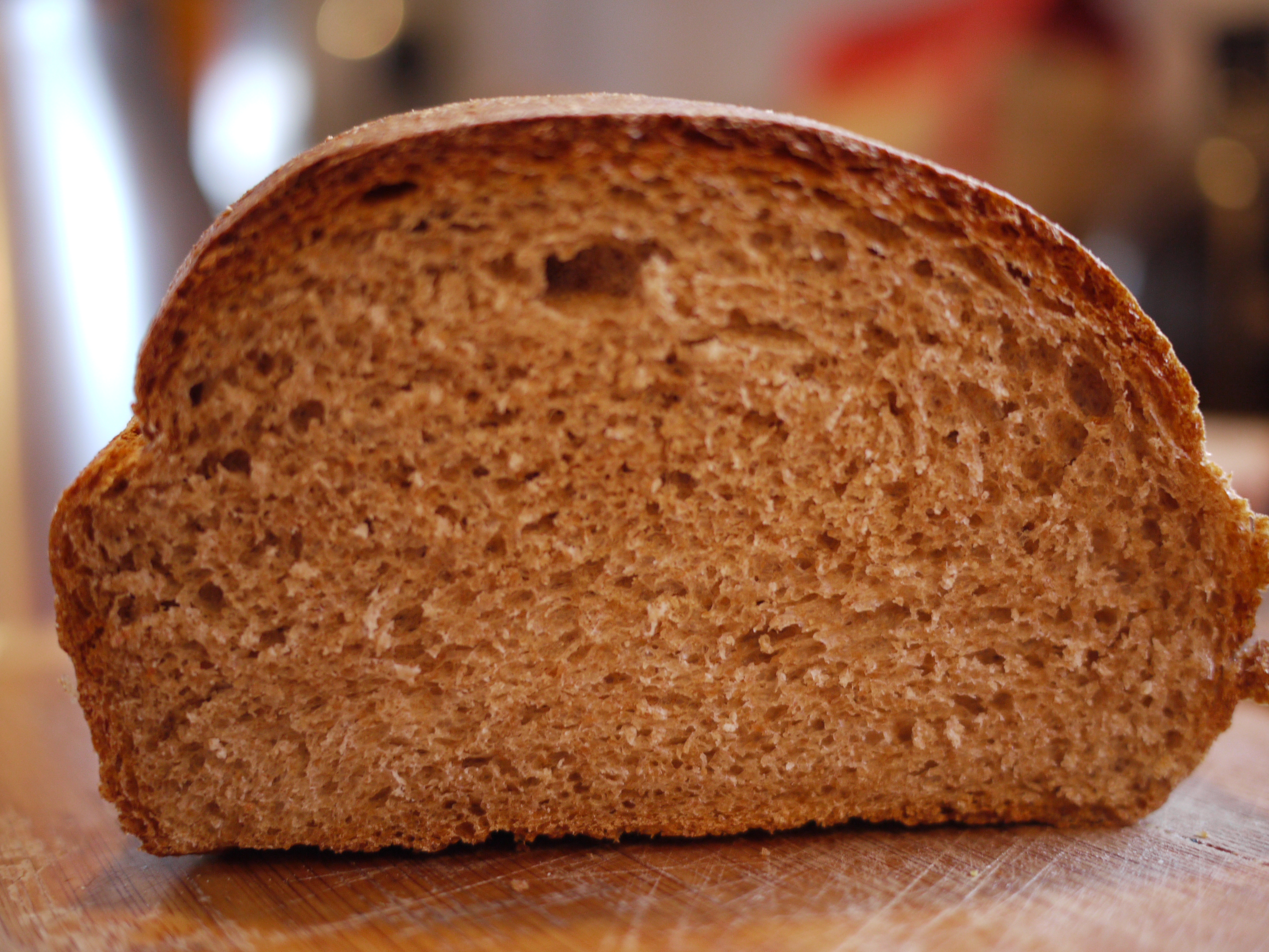 Ciemny pszenny chleb English | Polski | +/−